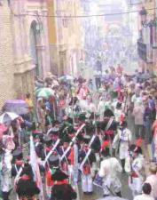 escaneada del boletín de fiestas 2006 de Paniza